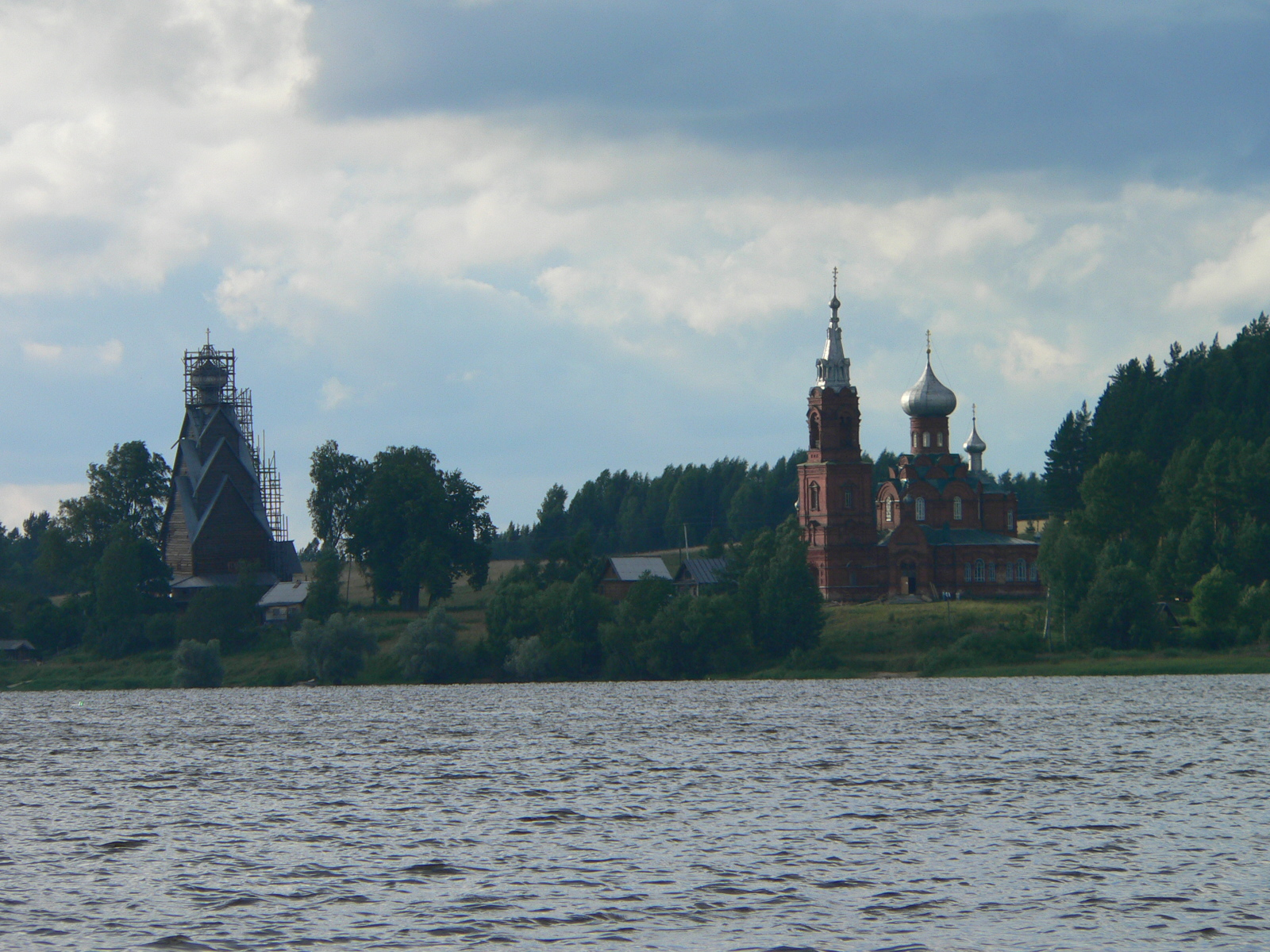 Ширков погост. Вид с озера